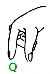 Der Buchstabe Q im deutschen Fingeralphabet, gemäß einer Infokarte des Landesverbandes Bayern der Gehörlosen e.V. (